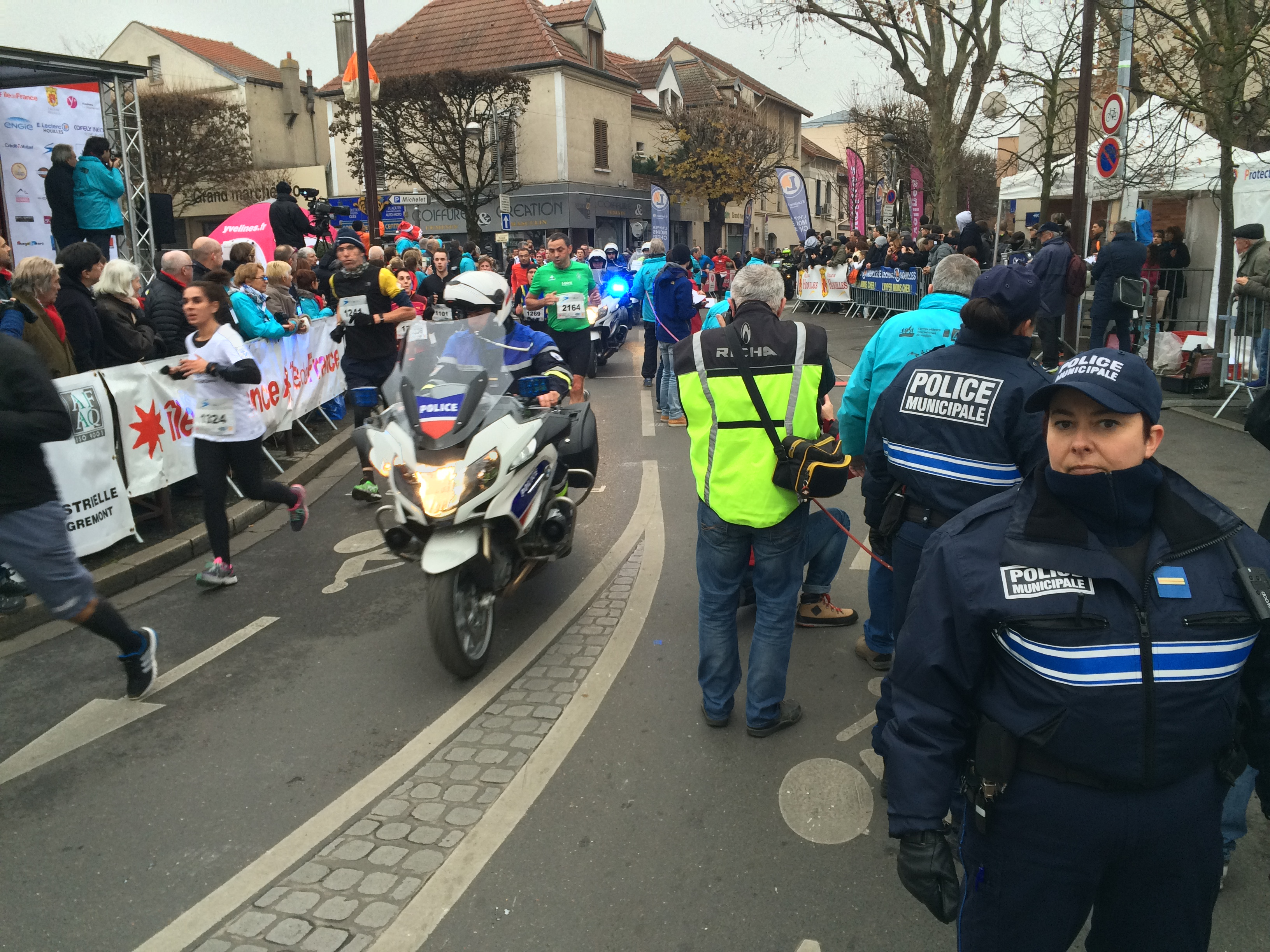 La course populaire